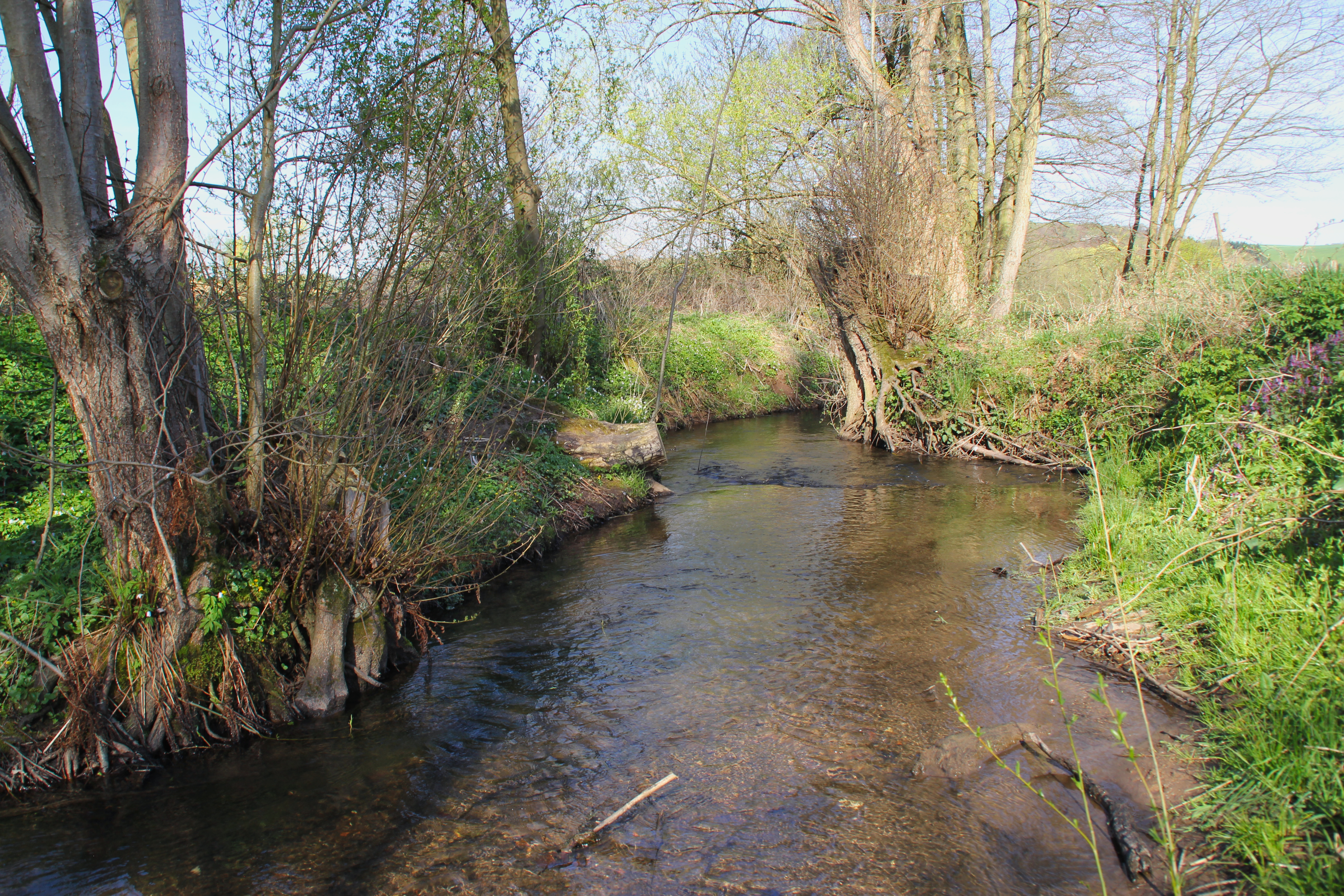 Die Sommerkahl (Speckkahl) nordwestlich von Sommerkahl, Bayern